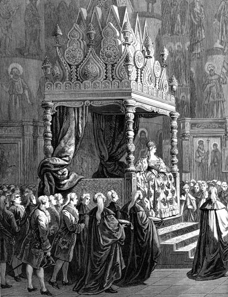 Екатерина II на Царском месте во время коронования в Успенском соборе. 22 сентября 1762 года. Гравюра по рисунку К. Броже. Начало 1880-х гг.